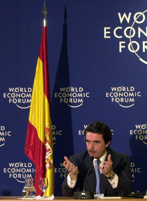 Jose Maria Aznar en la Cumbre anual de Davos en el año 2000